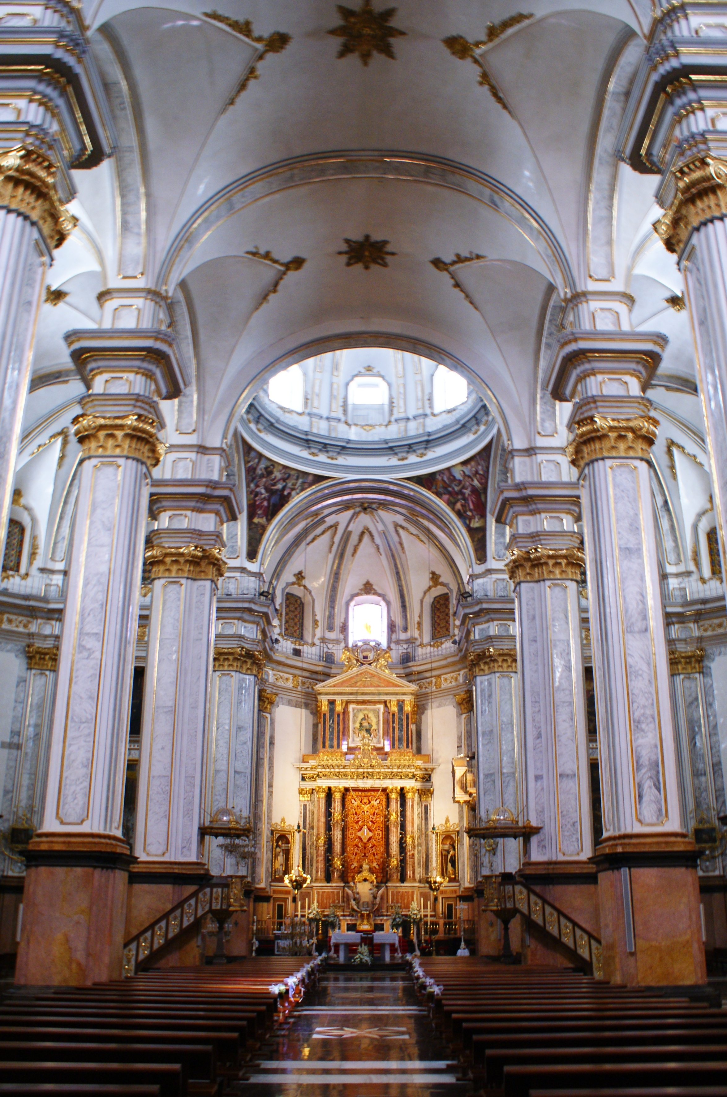 Nave central de la Iglesia de San Jaime de Villarreal (Castellón, España).